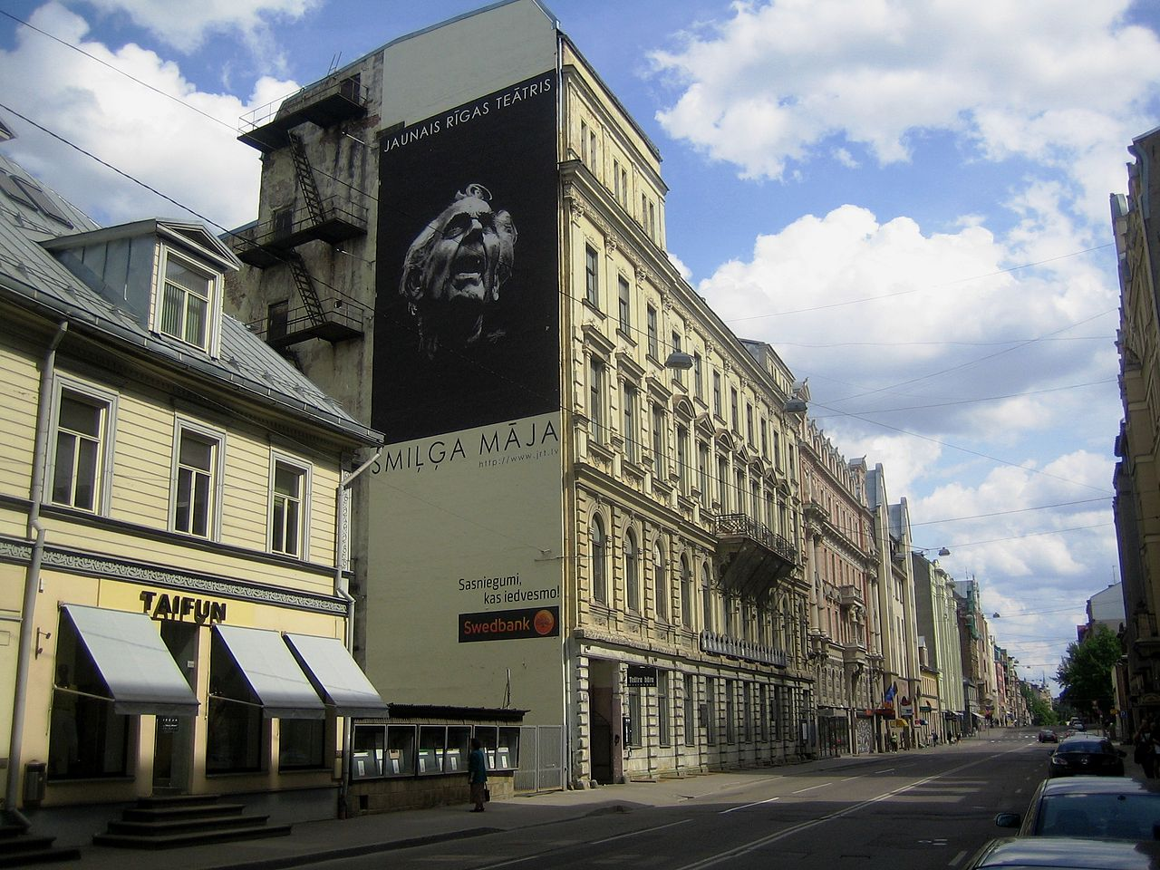 Nouveau théâtre de Riga